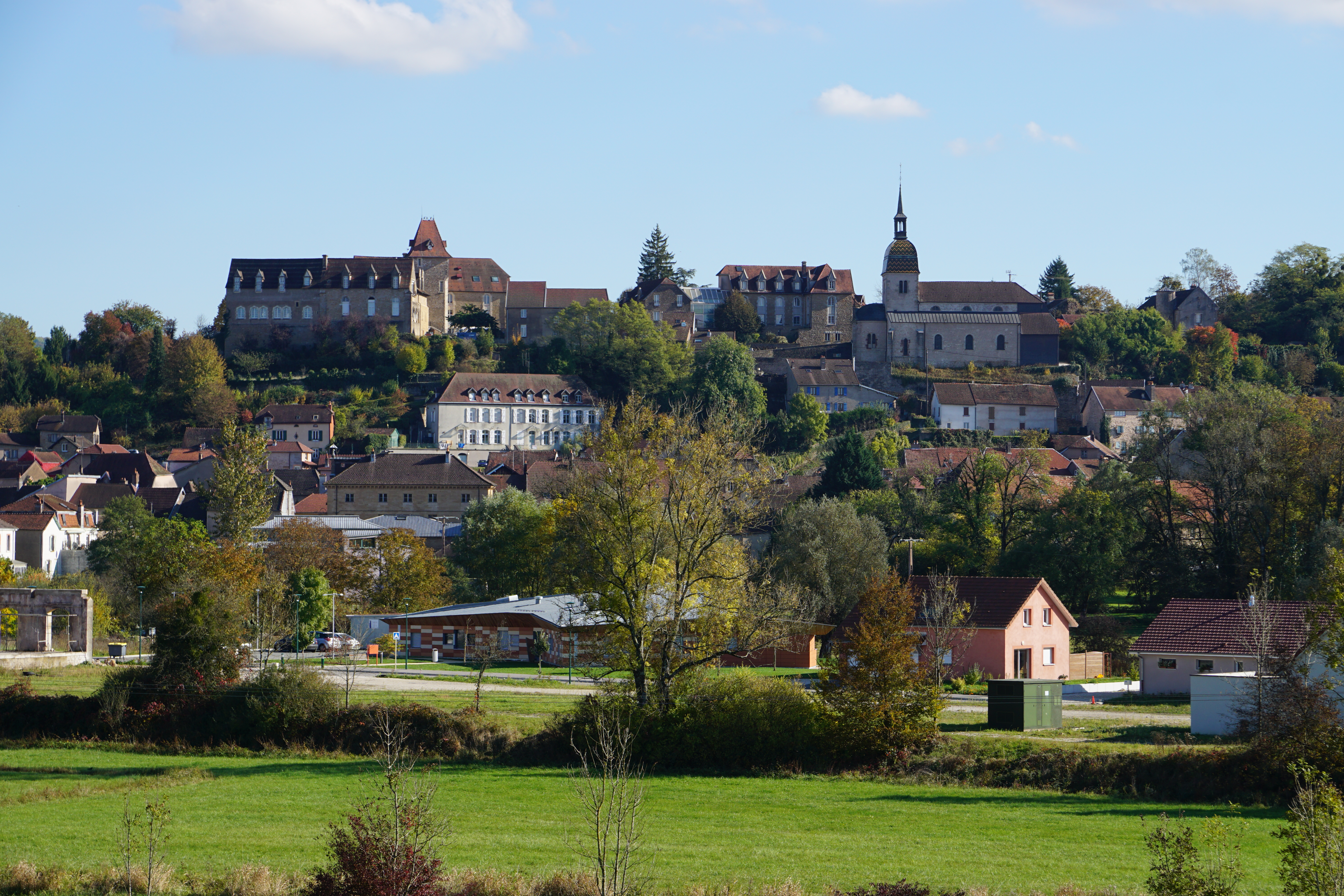 Vue générale de Rougemont (Doubs).